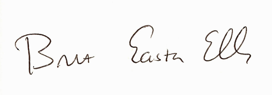 Signature de l'écrivain américain Bret Easton Ellis.